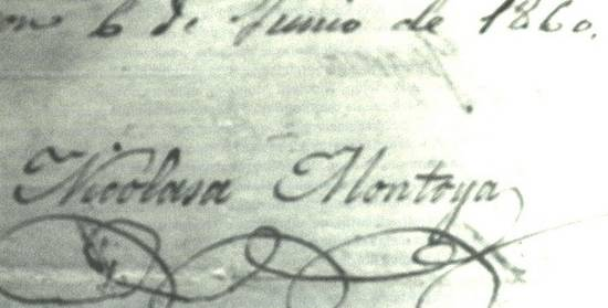 Firma de Dª Nicolasa Montoya, primera maestra de Pradejón, en un documento oficial de 1960.